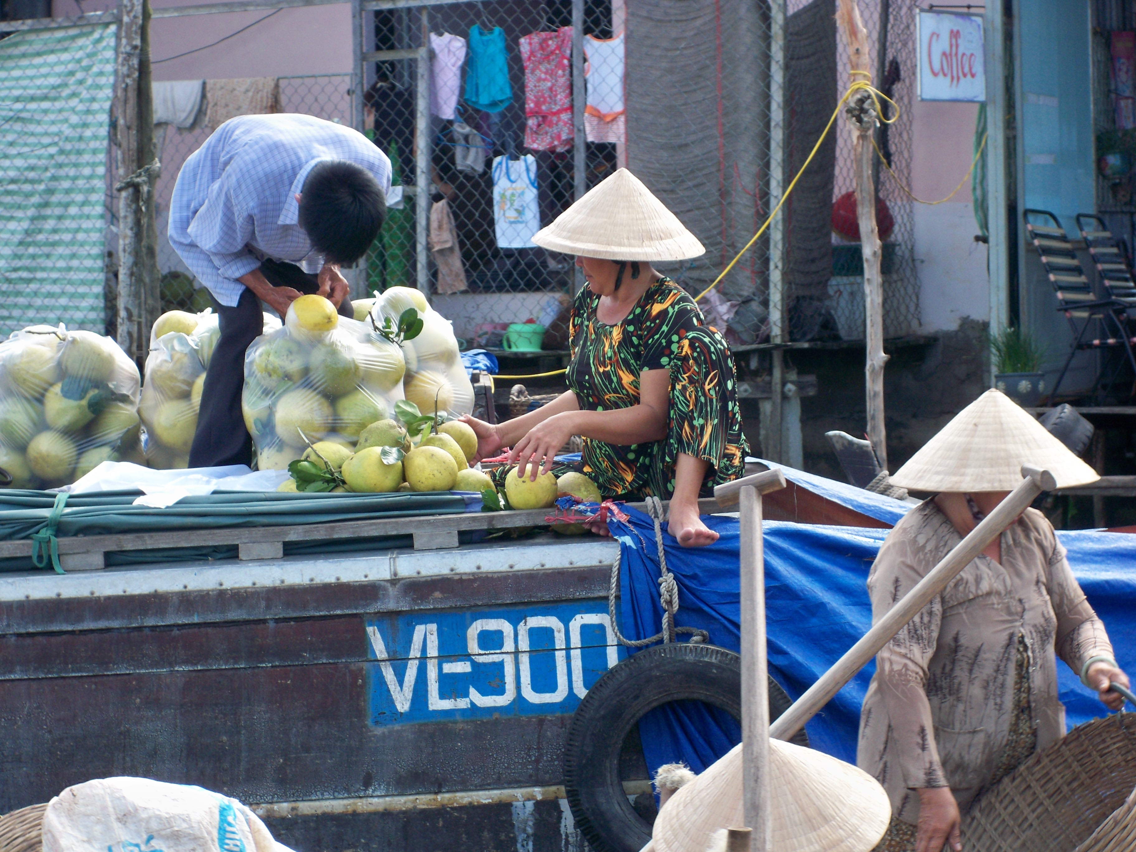 Chợ nổi Cái Răng